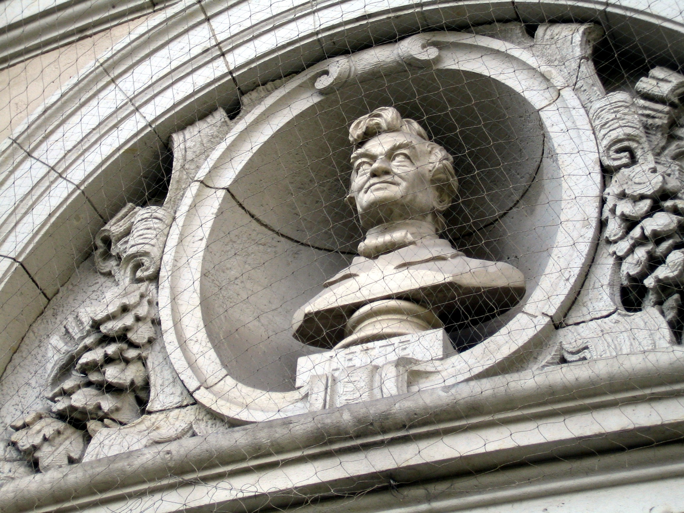 Lette-Verein Berlin, Viktoria-Luise-Platz. Architekturdetail mit Porträtplastik von Wilhelm Adolf Lette.